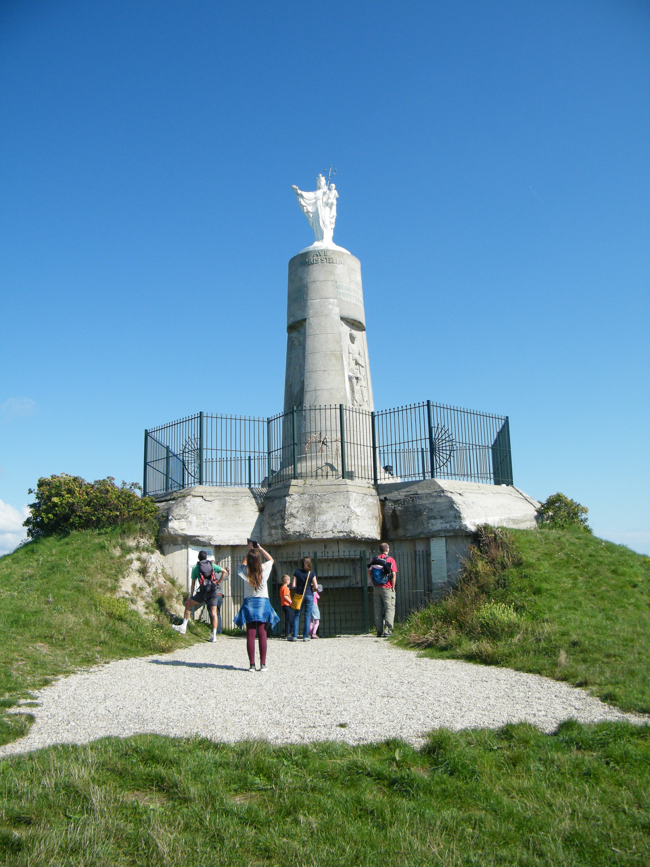 Mers-les-Bains, Somme, Fr, N-D de la falaise, reconstruite sur un blockhaus de la Deuxième Guerre mondiale.